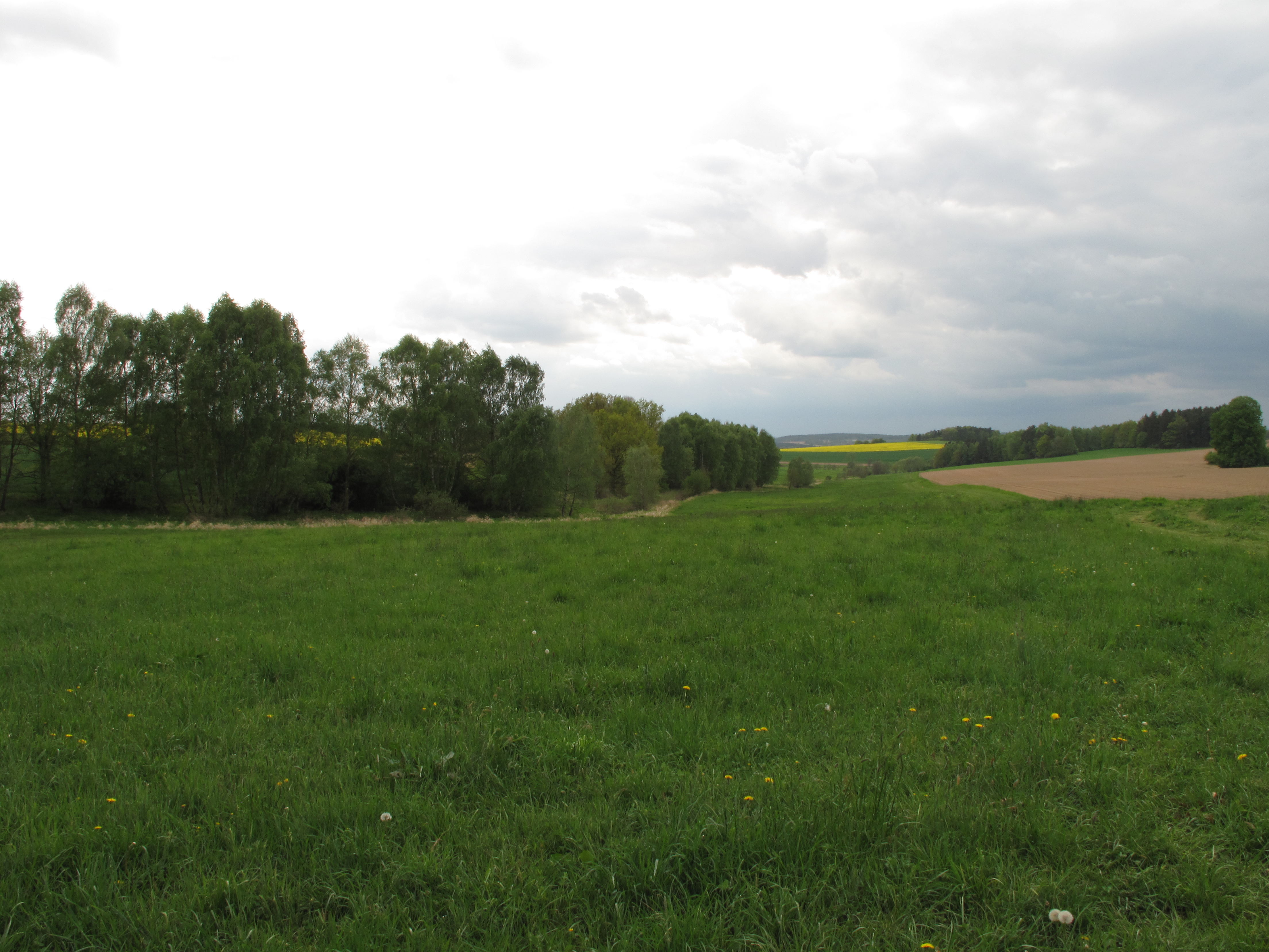 Pravětický potok pod rybníkem Louňov. Okres Benešov, Česká republika.